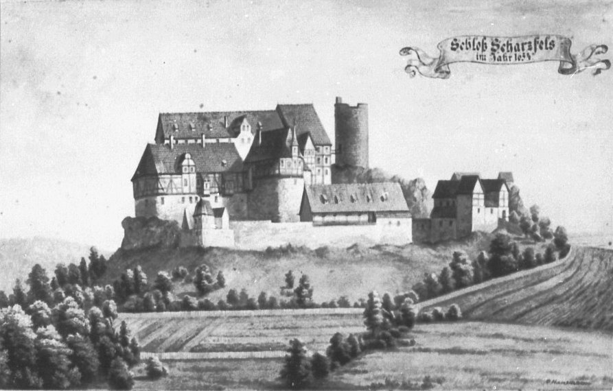 Die Burg Scharzfels im Jahre 1634, Kopie eines Kupferstichs von Matthäus Merian